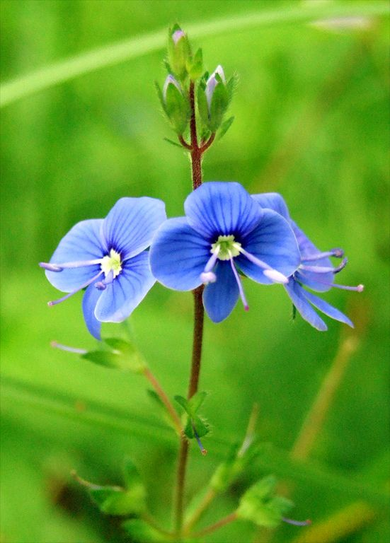 Ösztörűs veronika (Veronica chamaedrys)